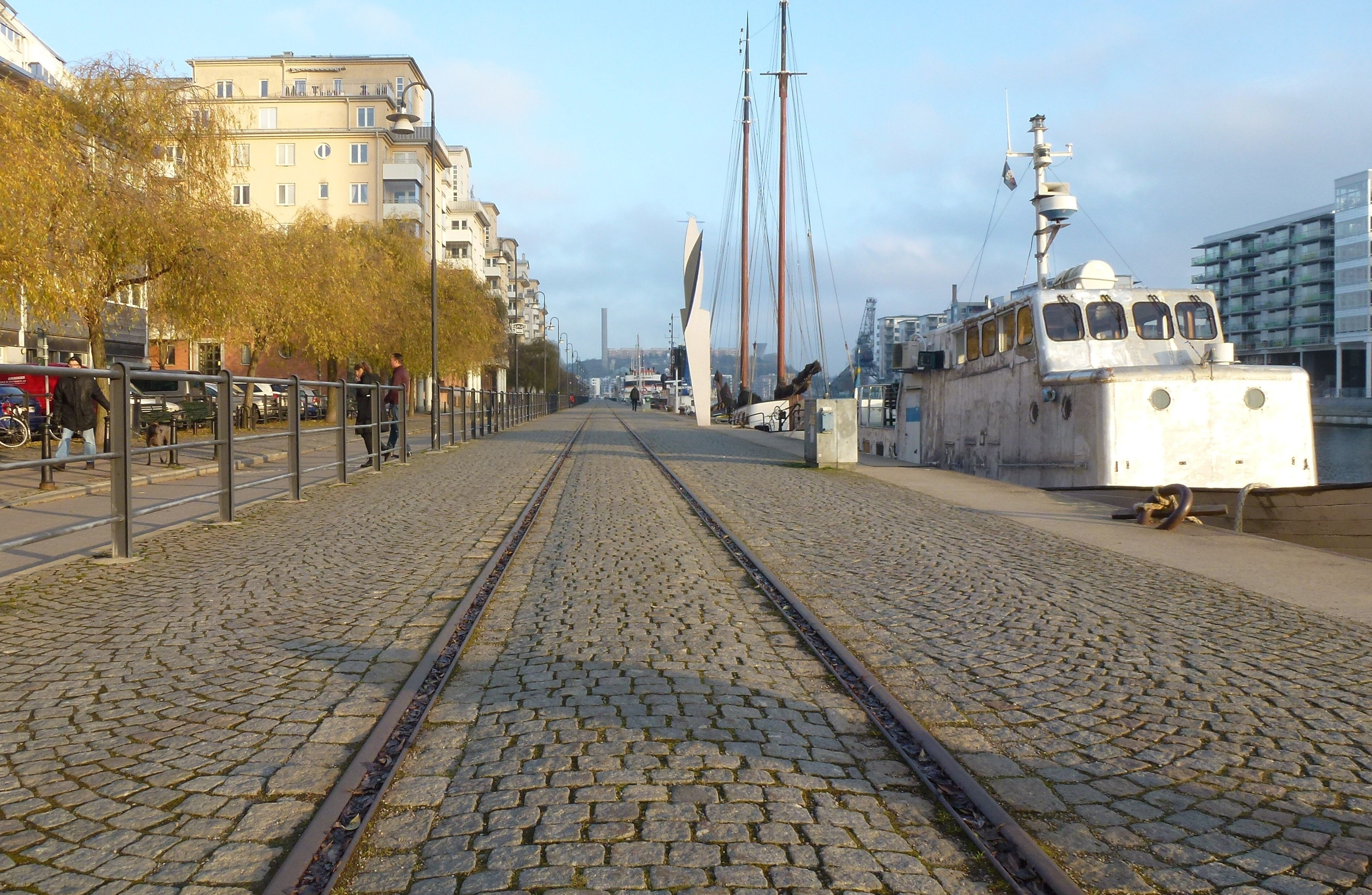 Norr Hammarbyhamnens kaj med hamnspåret